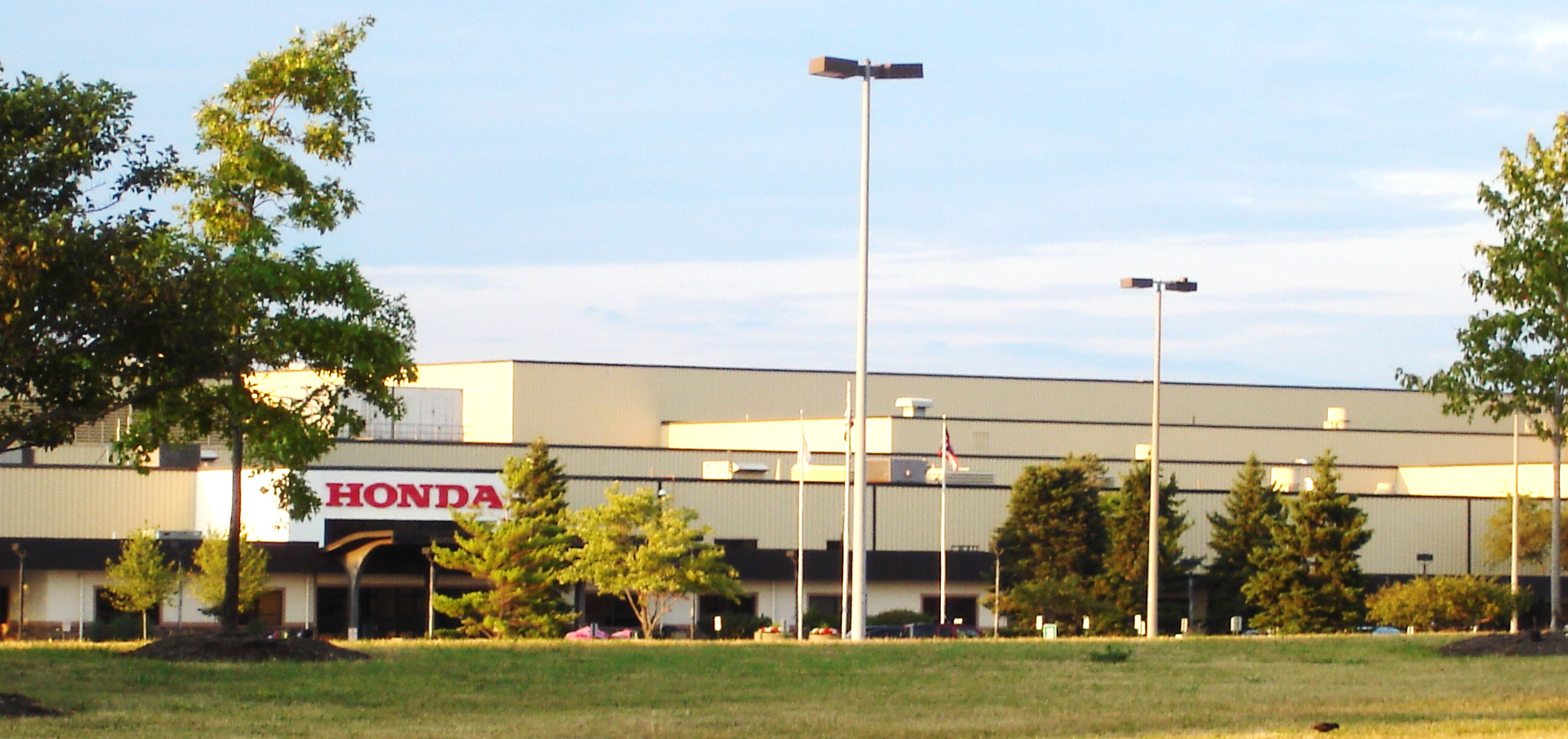 Honda Marysville